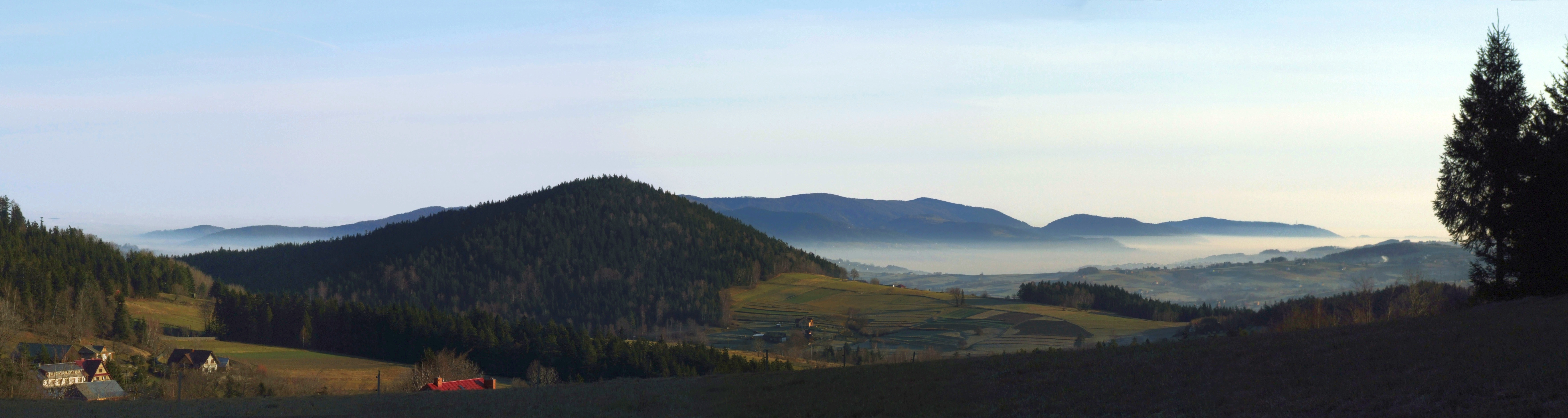 Świerczek, Słopnice i Pasmo Łososińskie nad morzem mgieł. Widok z Chyszówek.